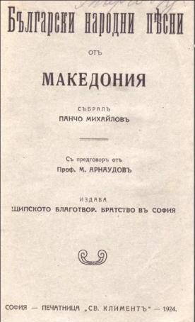 Български народни песни от Македония, 1924